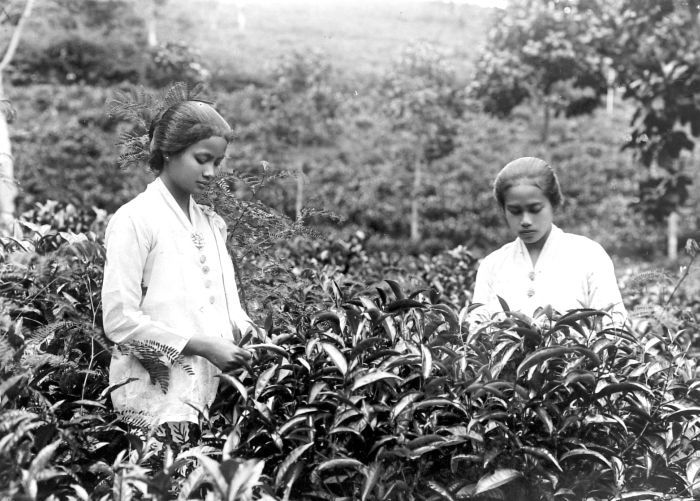 Repronegatief. Soendanese theepluksters